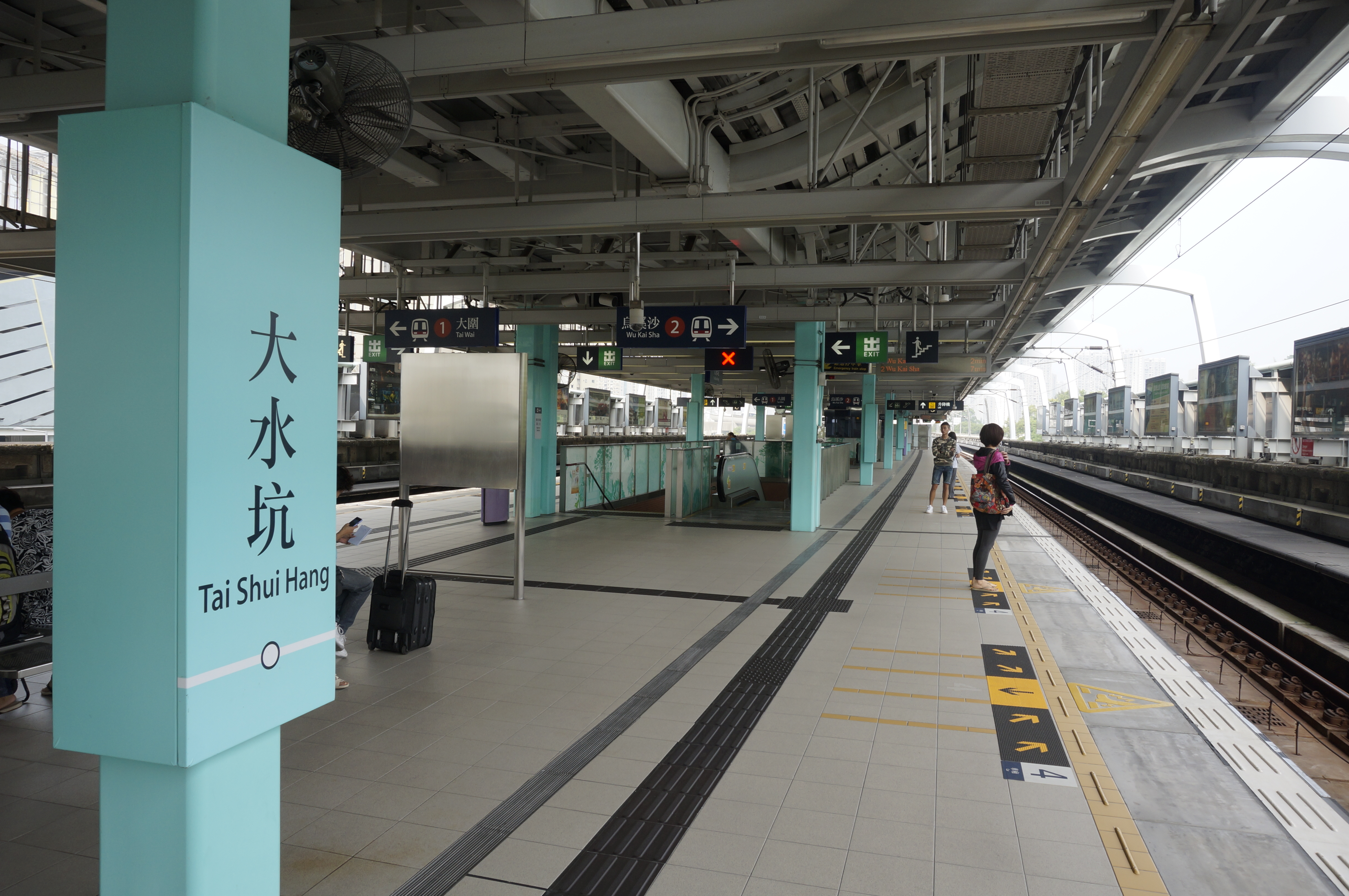 港鐵大水坑站月台